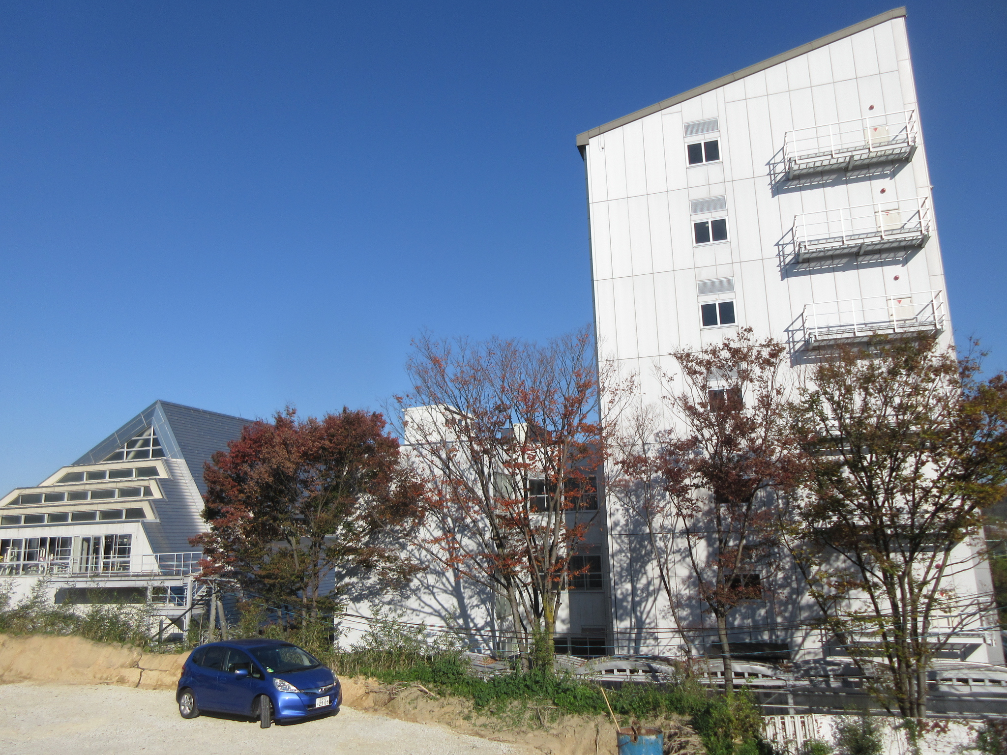 岡崎学園高等学校（岡崎市稲熊町）